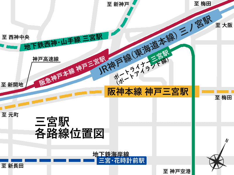 三宮駅各路線位置図